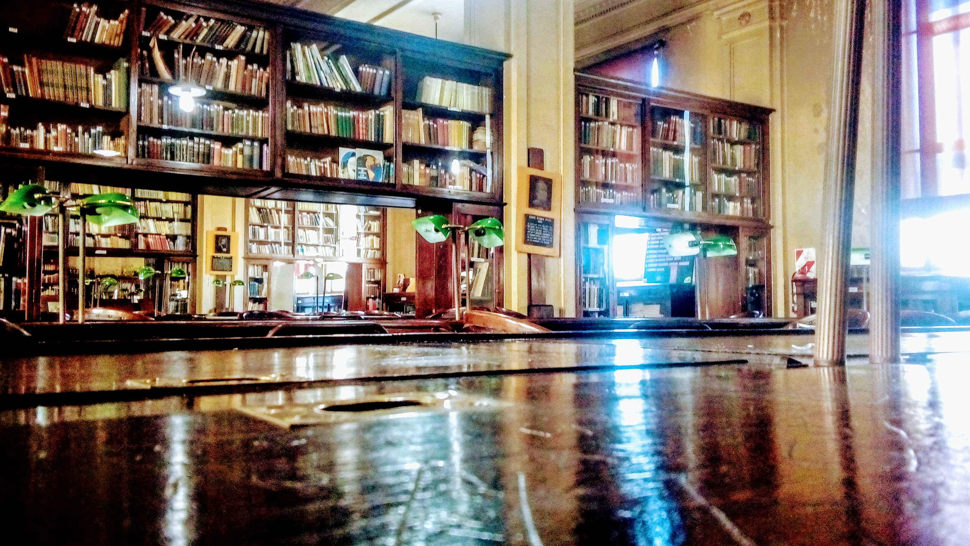 Esta la bibliotecainstituto felix fernando bernasconi